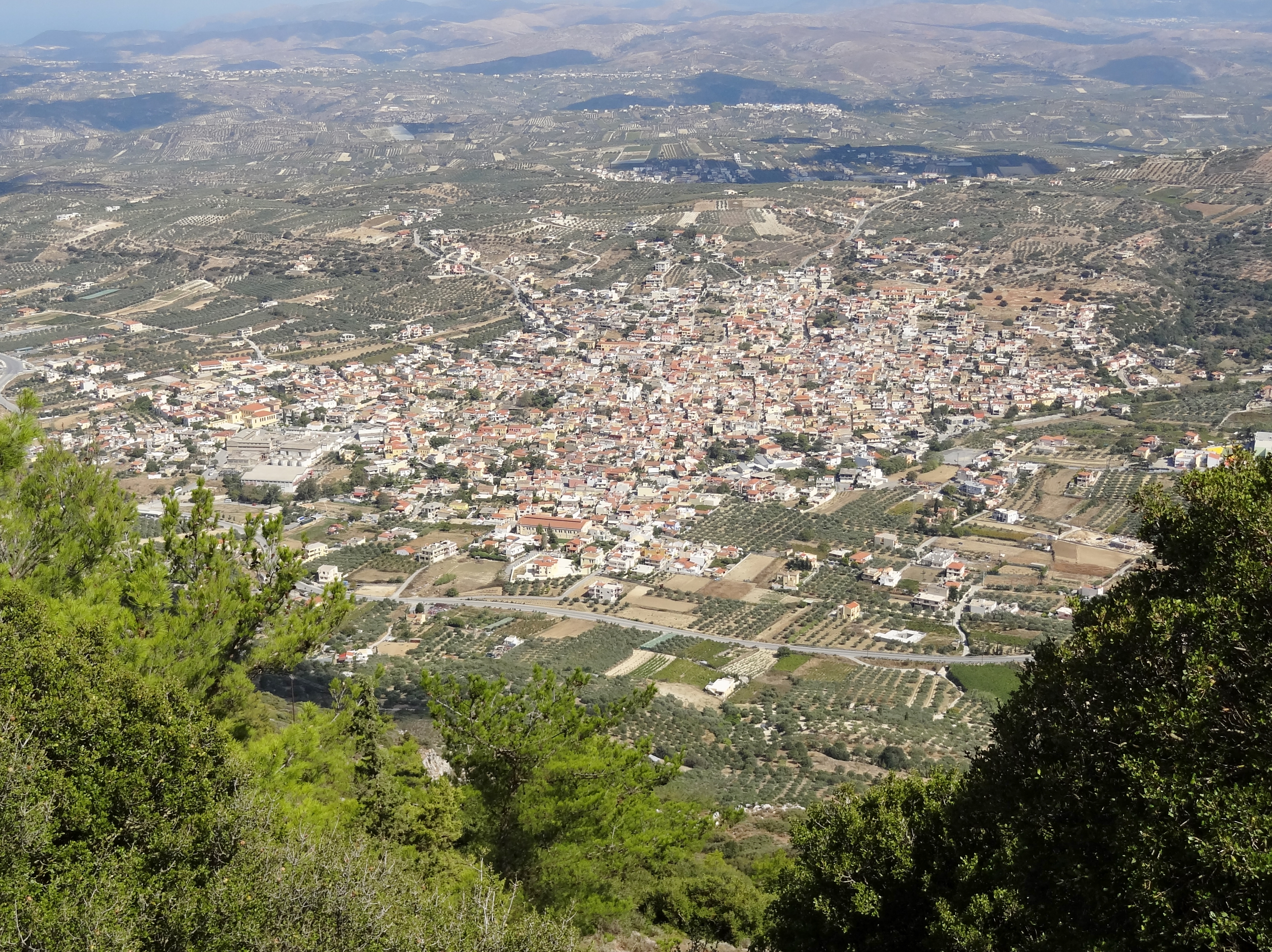 Blick auf Archanes (Αρχάνες), Kreta, Griechenland